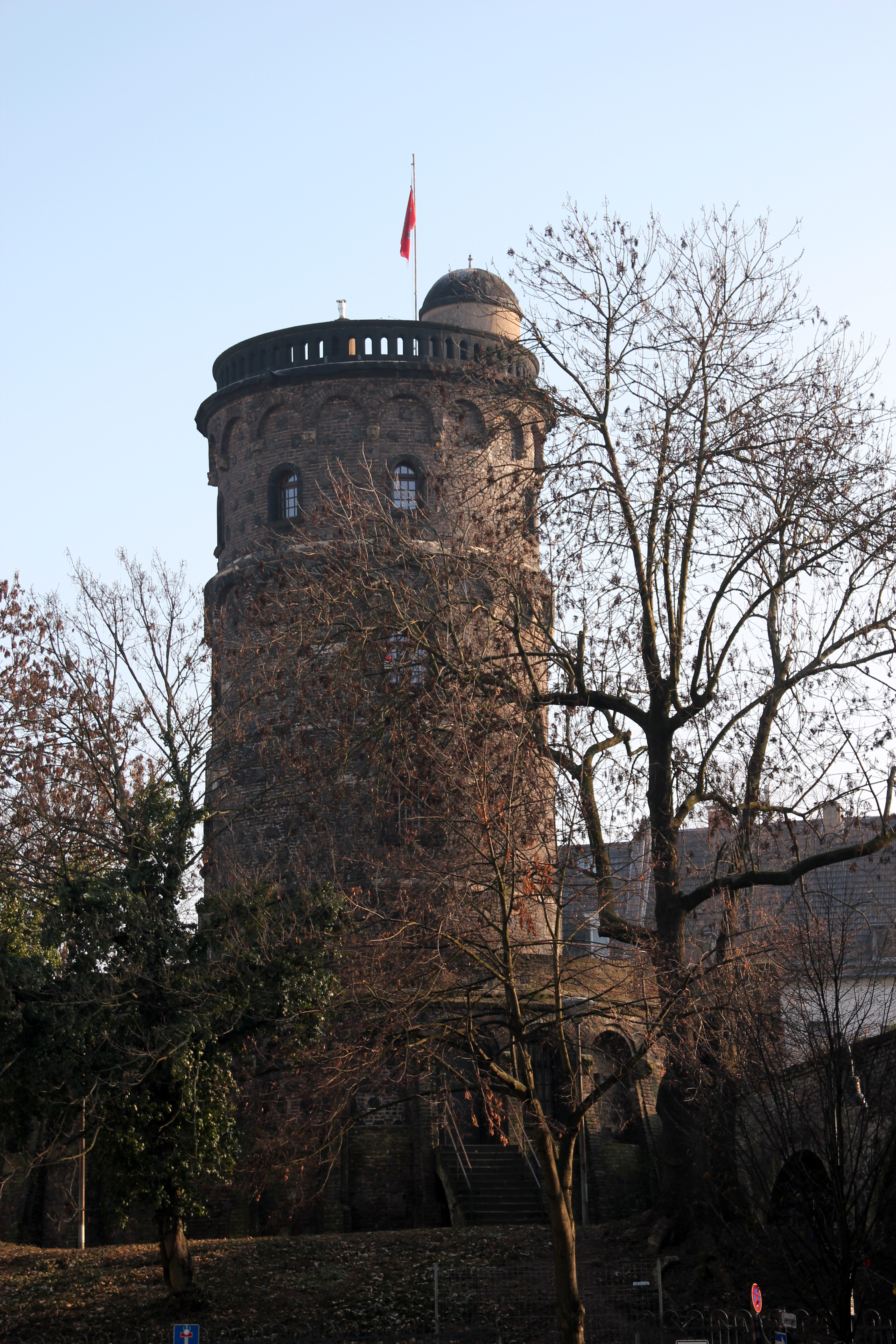 Köln, Bottmühle in der Nähe des Chlodwigplatzes This is a photograph of an architectural monument.